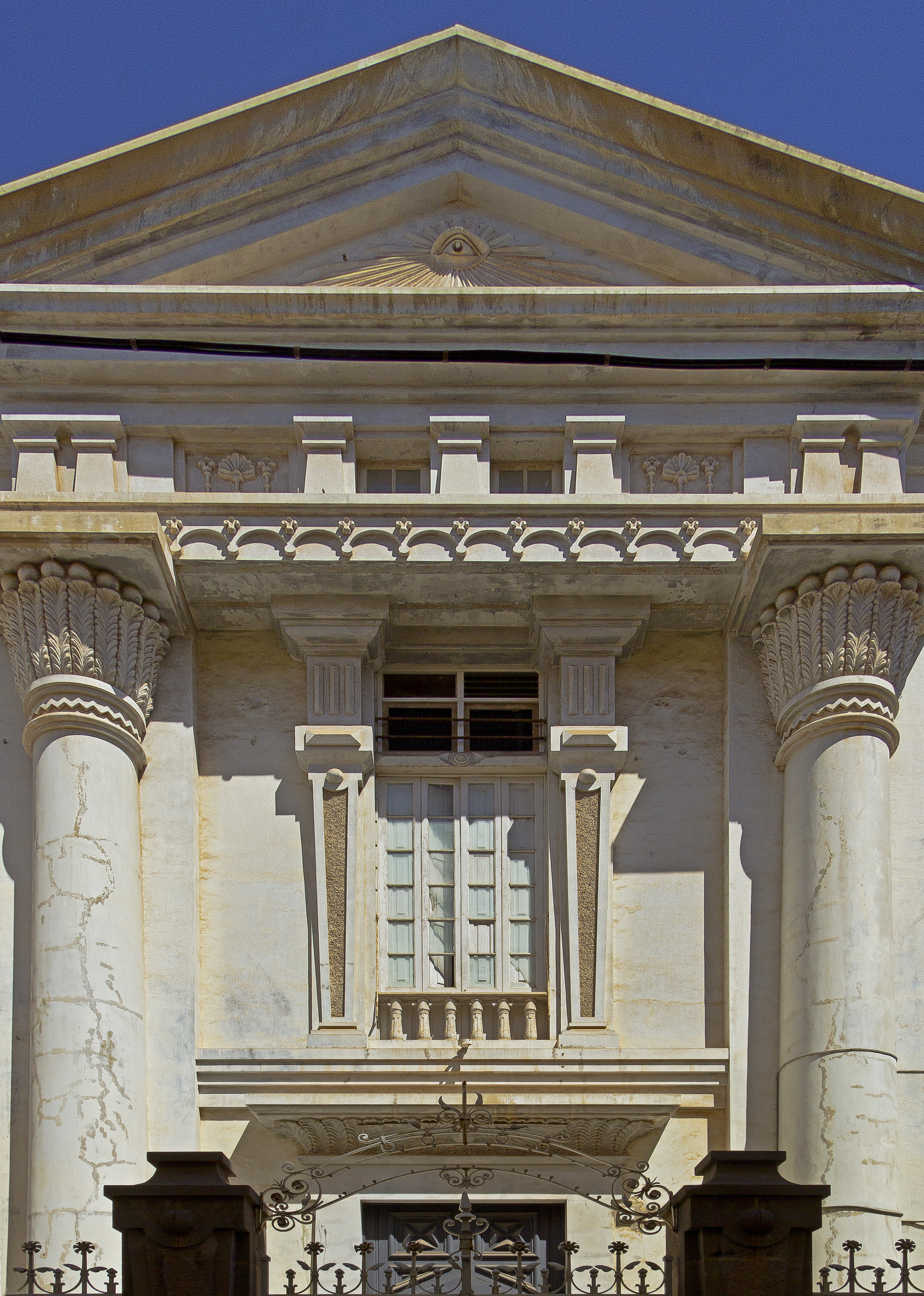 Mittelteil der Fassade des „Templo Masónico“ in Santa Cruz de Tenerife